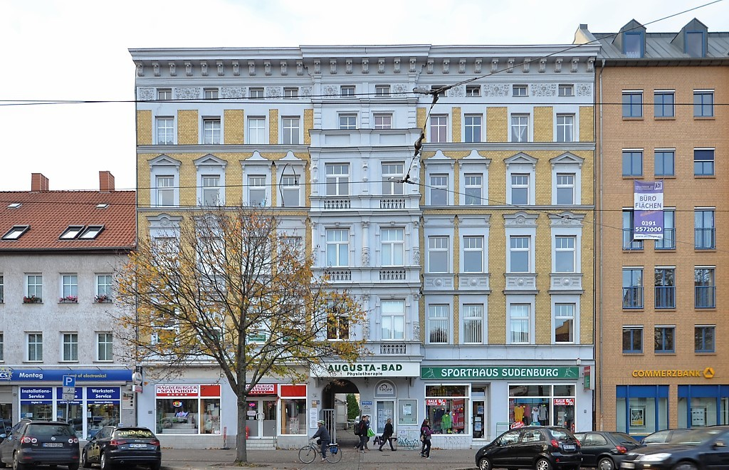 Magdeburg - Sudenburg - Wohn- und Geschäftshaus, Halberstädter Straße 122